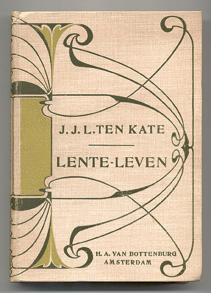 Boekomslag: Lente-leven. Zonder druk ca. 1909. Auteur: J.J.L. ten Kate. Bandontwerp: A. Sipkema. Uitgeverij: A.W. Sijthoff